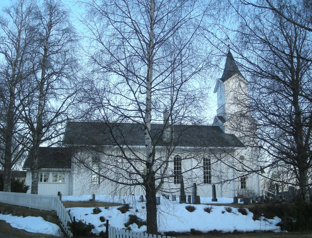 Søre Osen kirke (Trysil kommune)